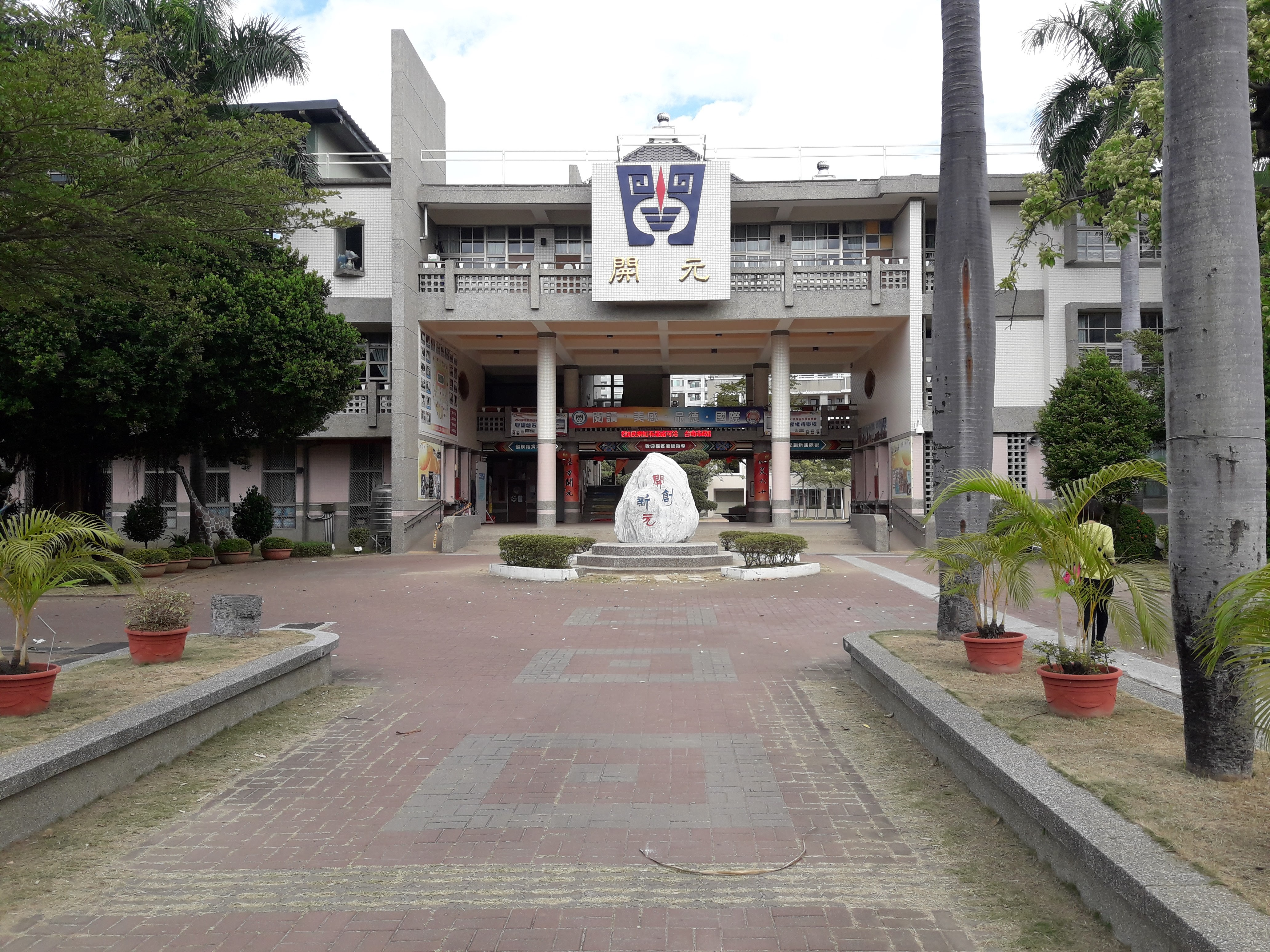 中文（台灣）: 開元國小忠誠樓。